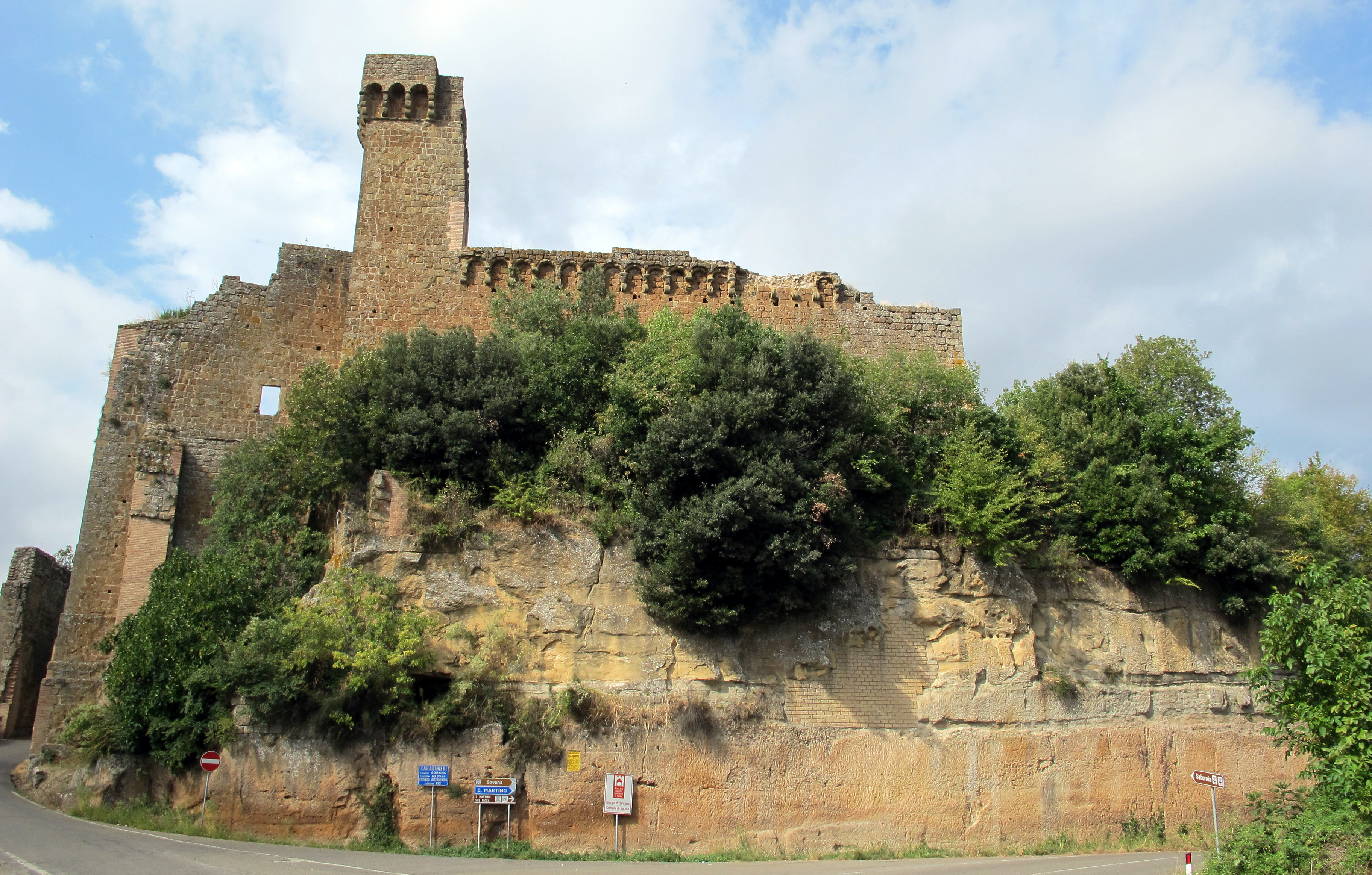 Sovana